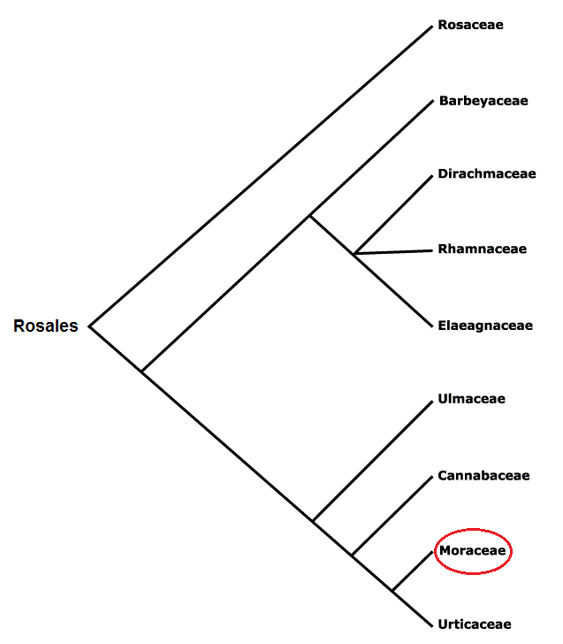 Posição de Moraceae dentro de sua ordem, indicando as relações e proximidades evolutivas entre os clados.